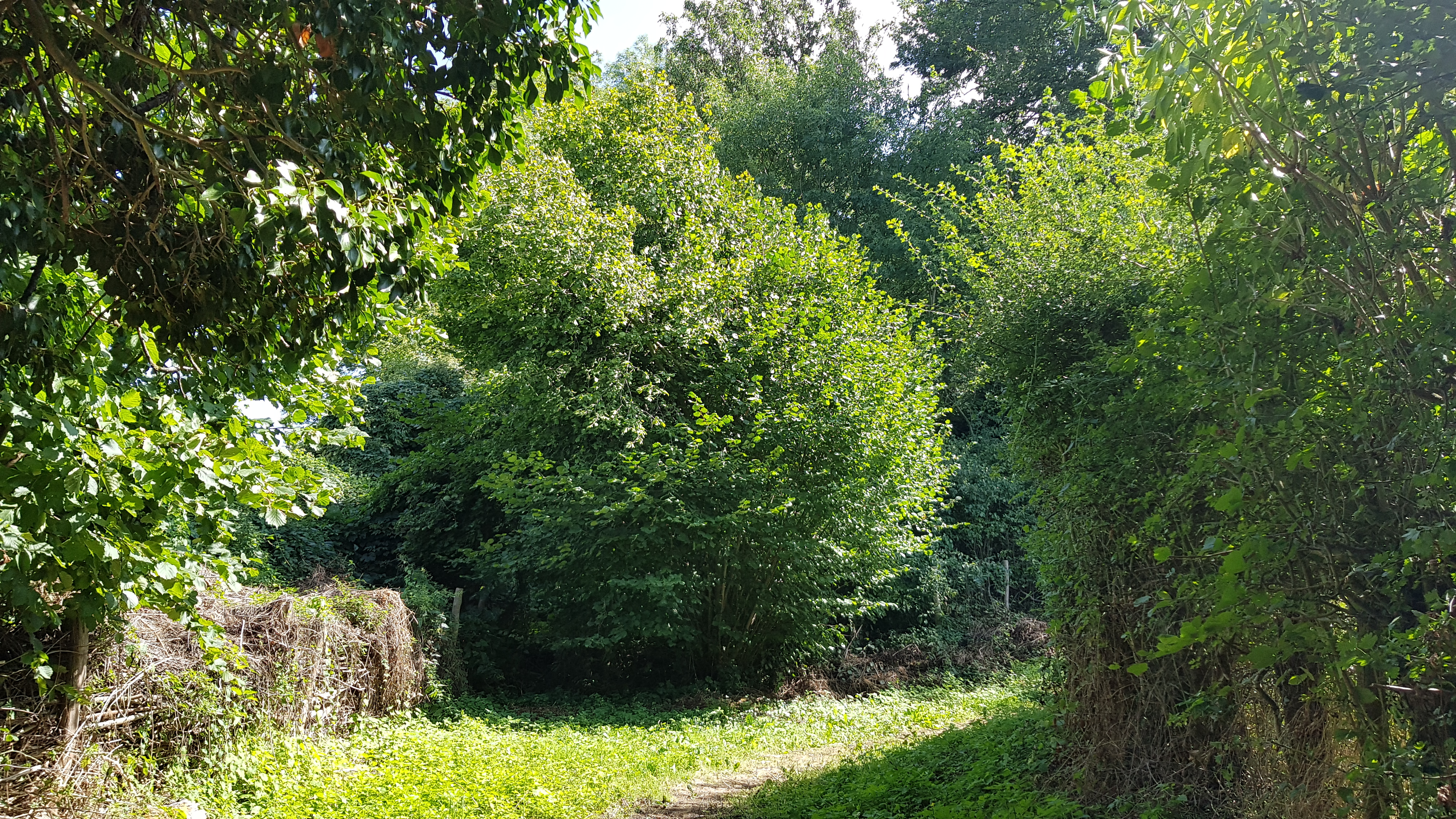 Groeve Onder de weg, Bemelen, Nederland